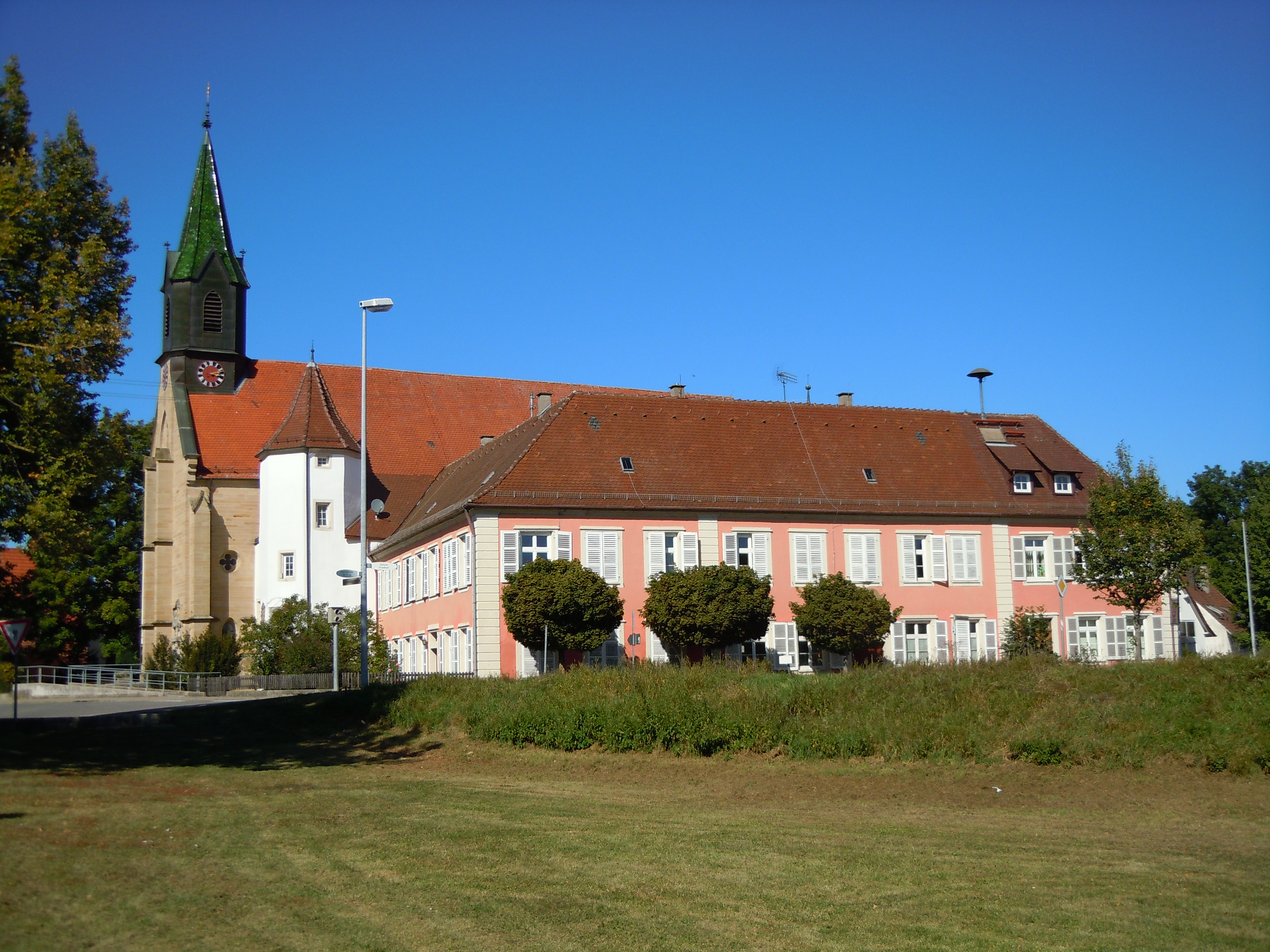 Ensemble in Hemmendorf (Rottenburg am Neckar). Von vorne nach hinten: Ostflügel der Dreiflügel-Schlossanlage (1790/91), achteckiger Turm vom Vorgängerbau der Spätrenaissance (1608/09), nördlich angeschlossen die Johanniterkirche und Pfarrkirche St. Johannes Baptist (14. Jh.).